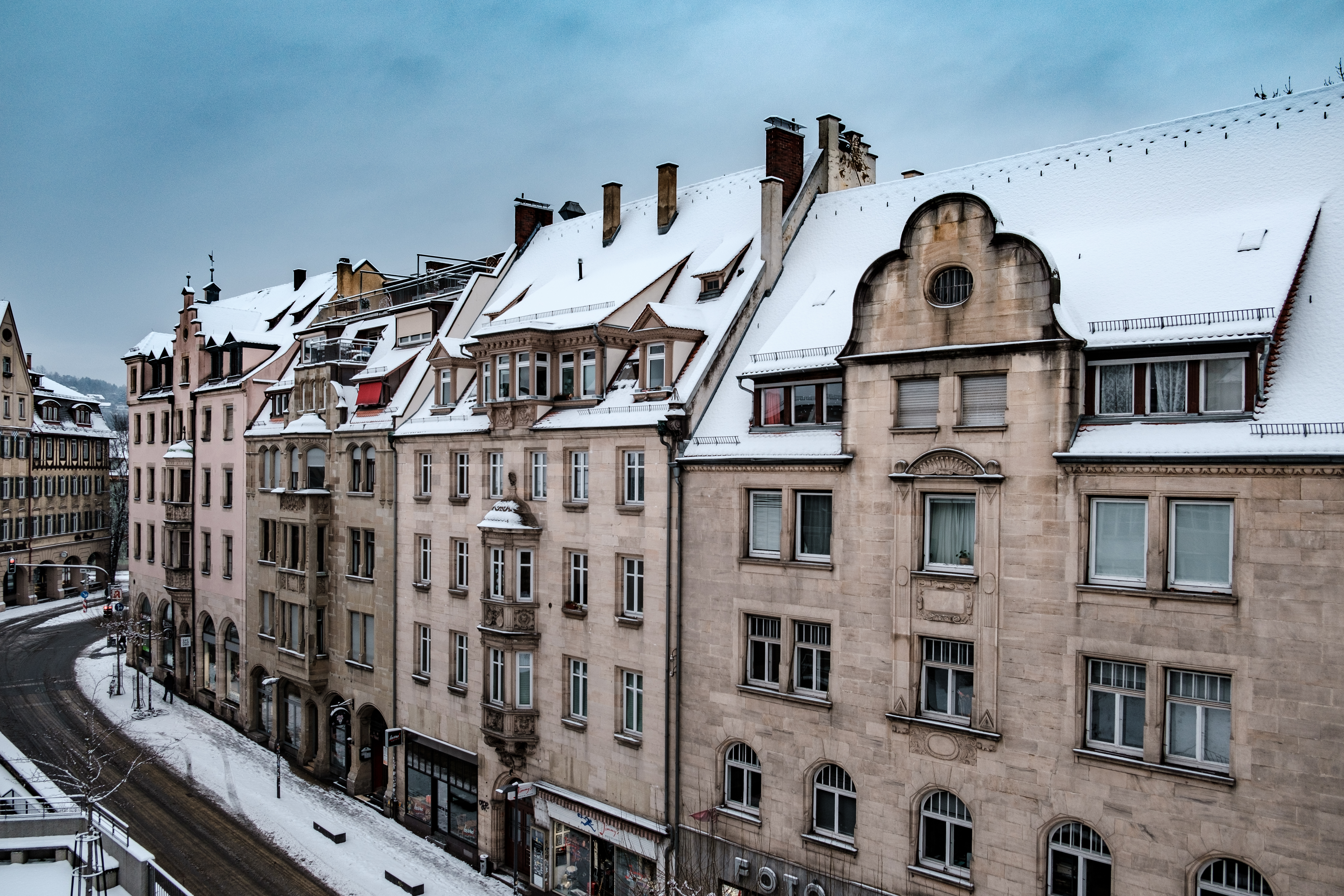 Mühlstraße in Tübingen mit Schnee